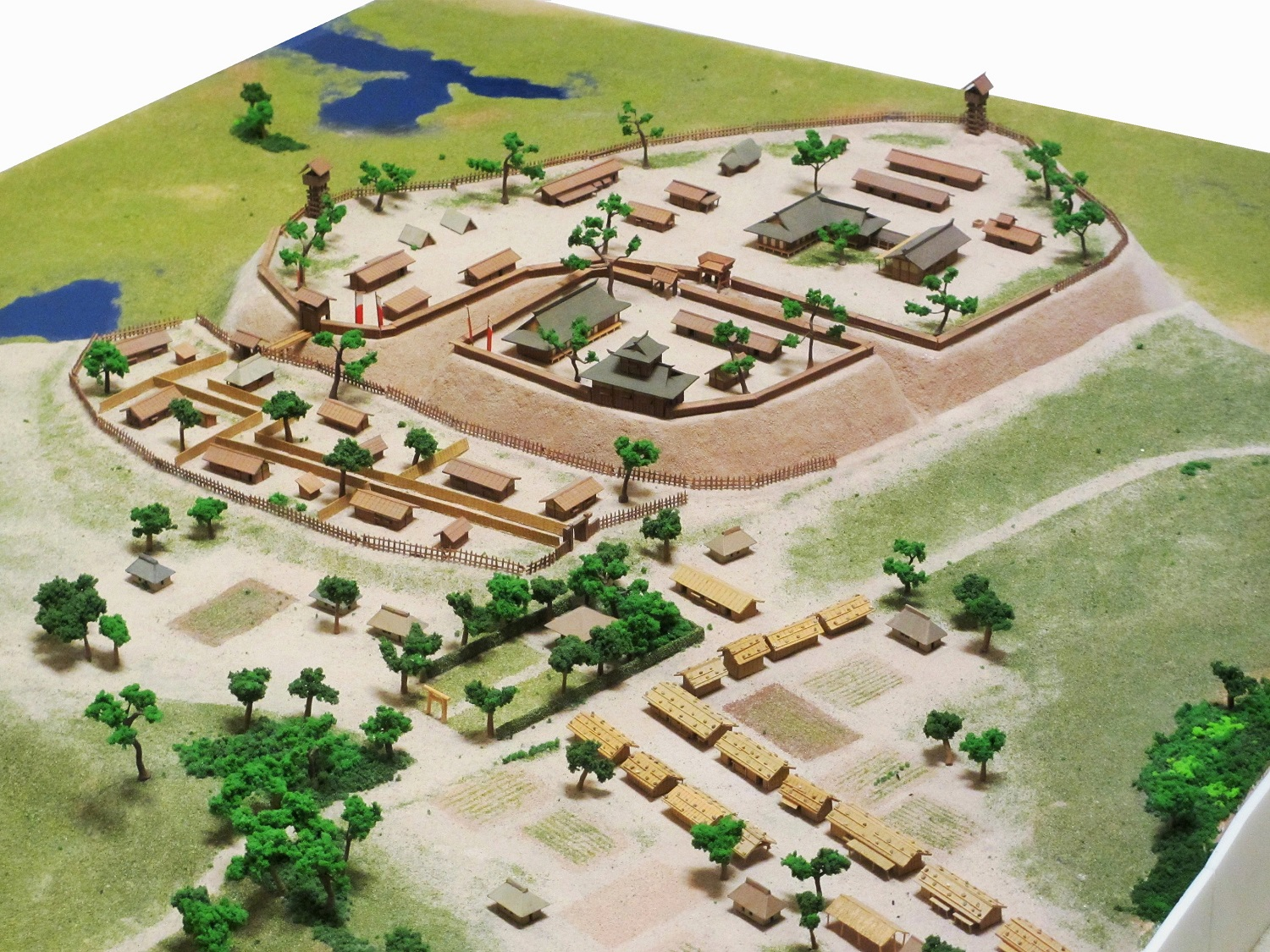 名古屋市立守山図書館